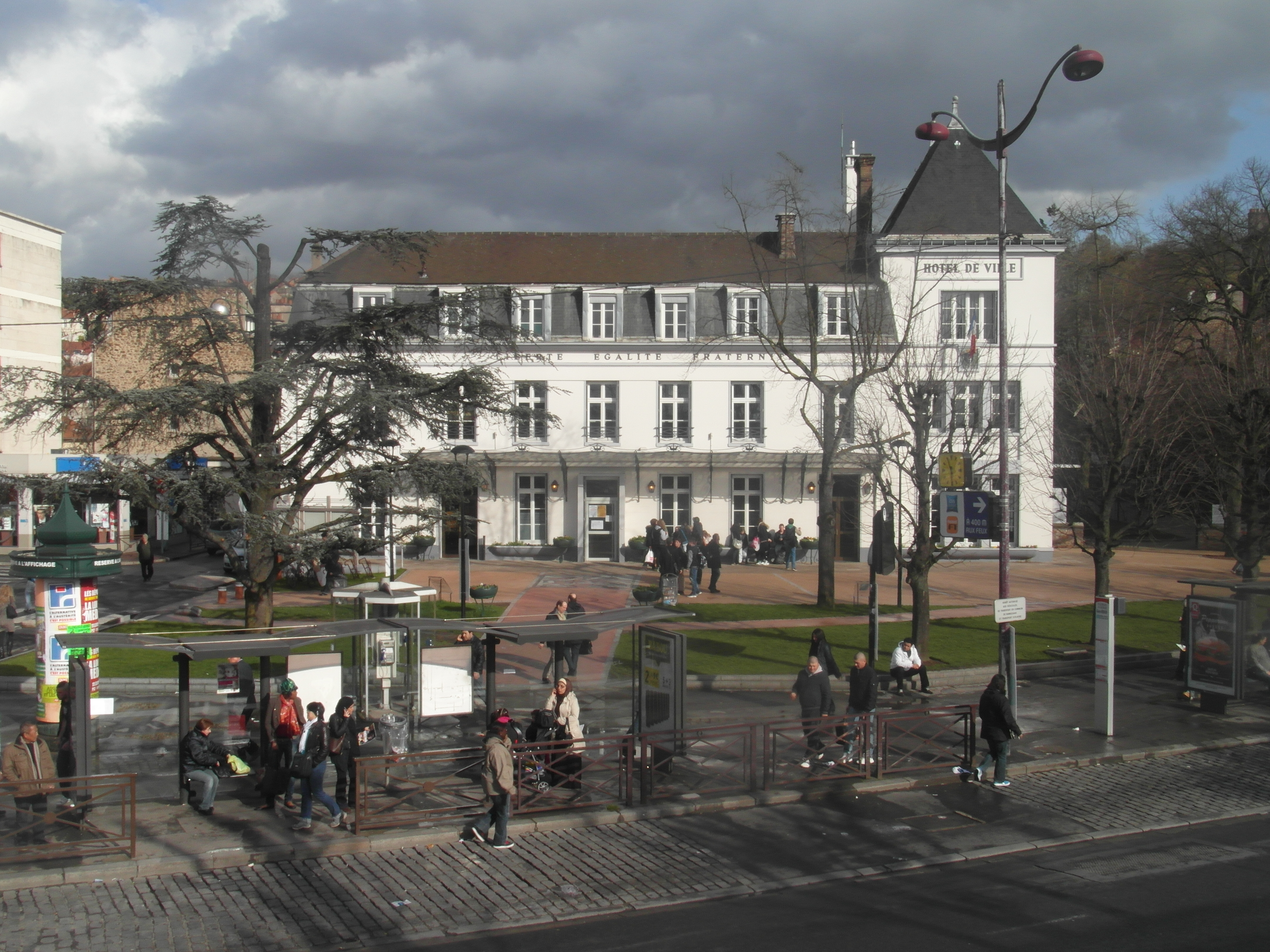 Mairie de Villeneuve-Saint-Georges (Val-de-Marne, Île-de-France, France).